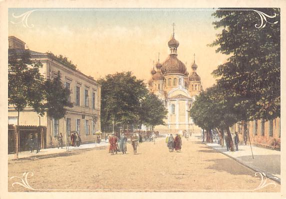 Kielce - cerkiew przy ulicy Wniebowstąpienia (wówczas Wozniesienskaja)